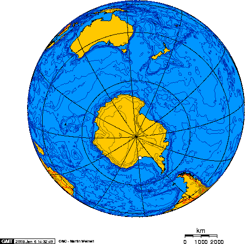 Vahsel Bay